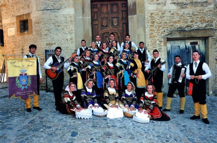 Il Gruppo Stabile Folklorico "Maria di Pierro" Genzano di Lucania (Pz) sul portale della Chiesa della SS Annunziata.